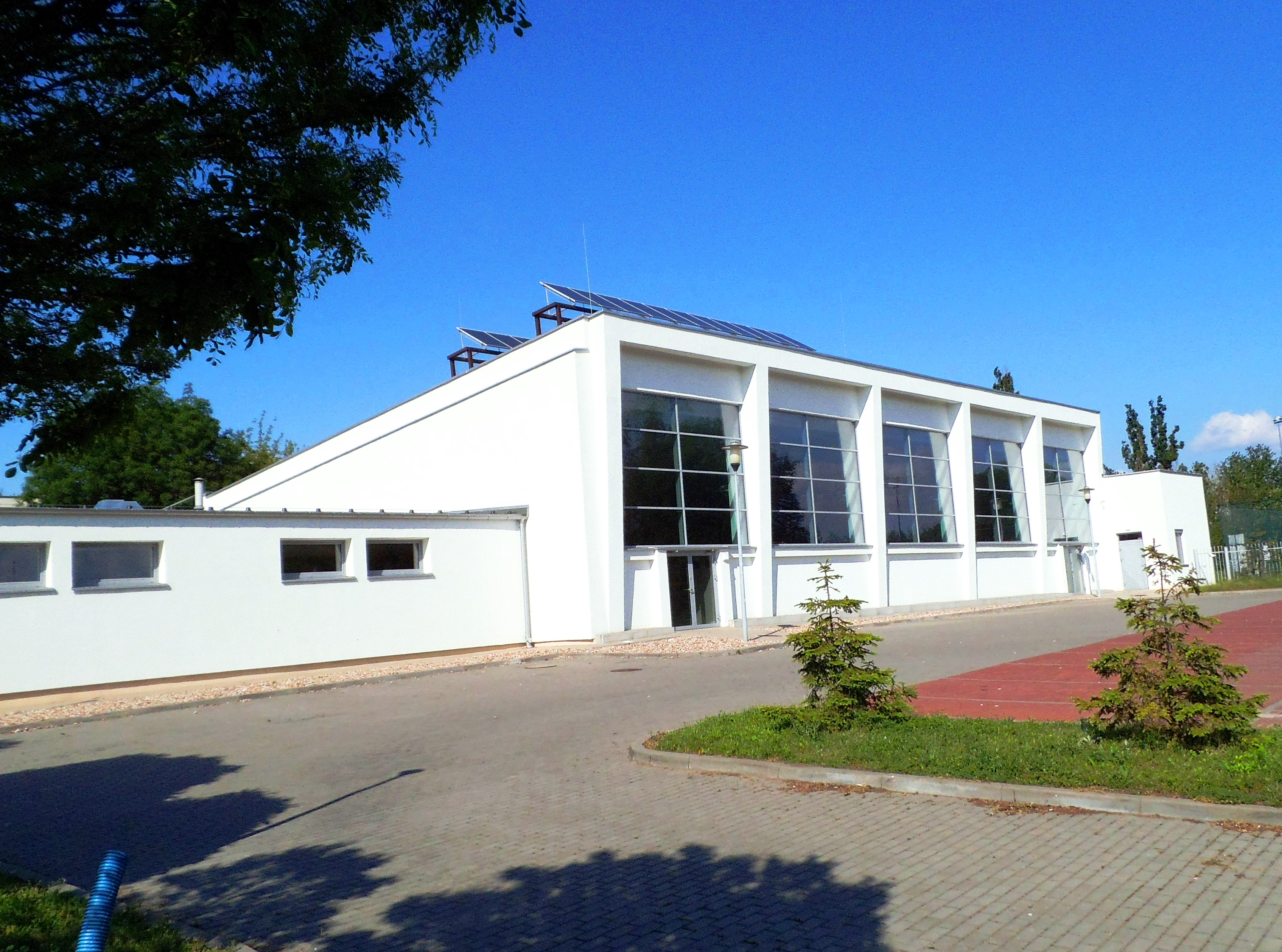 Pływalnia ZSMEiE w Toruniu1